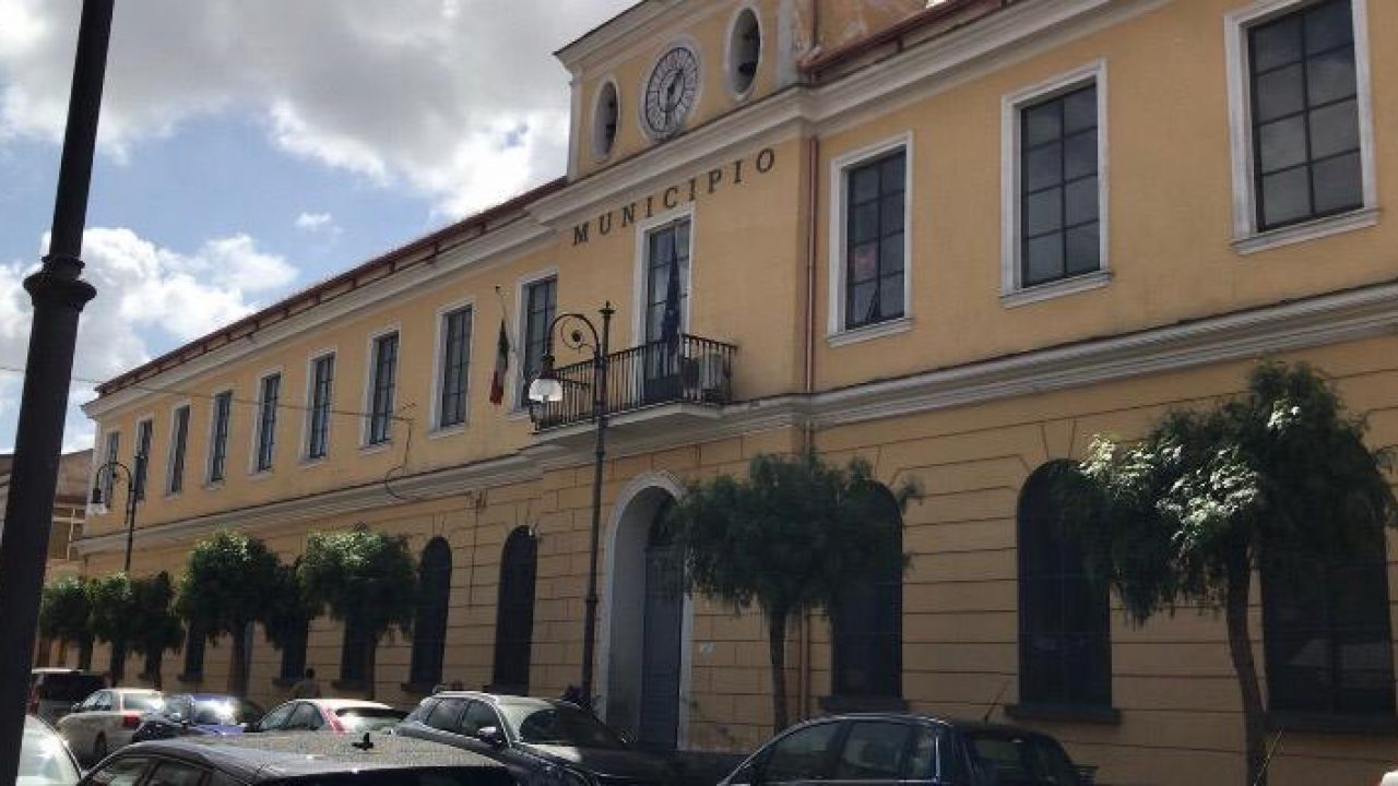 Palazzo del municipio di Teverola